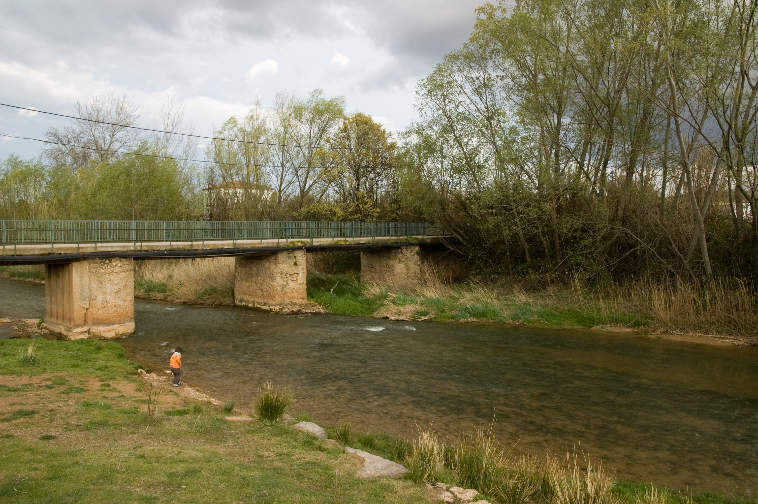 Semana Santa en Terrer (Zaragoza). Motarile, rile, rile